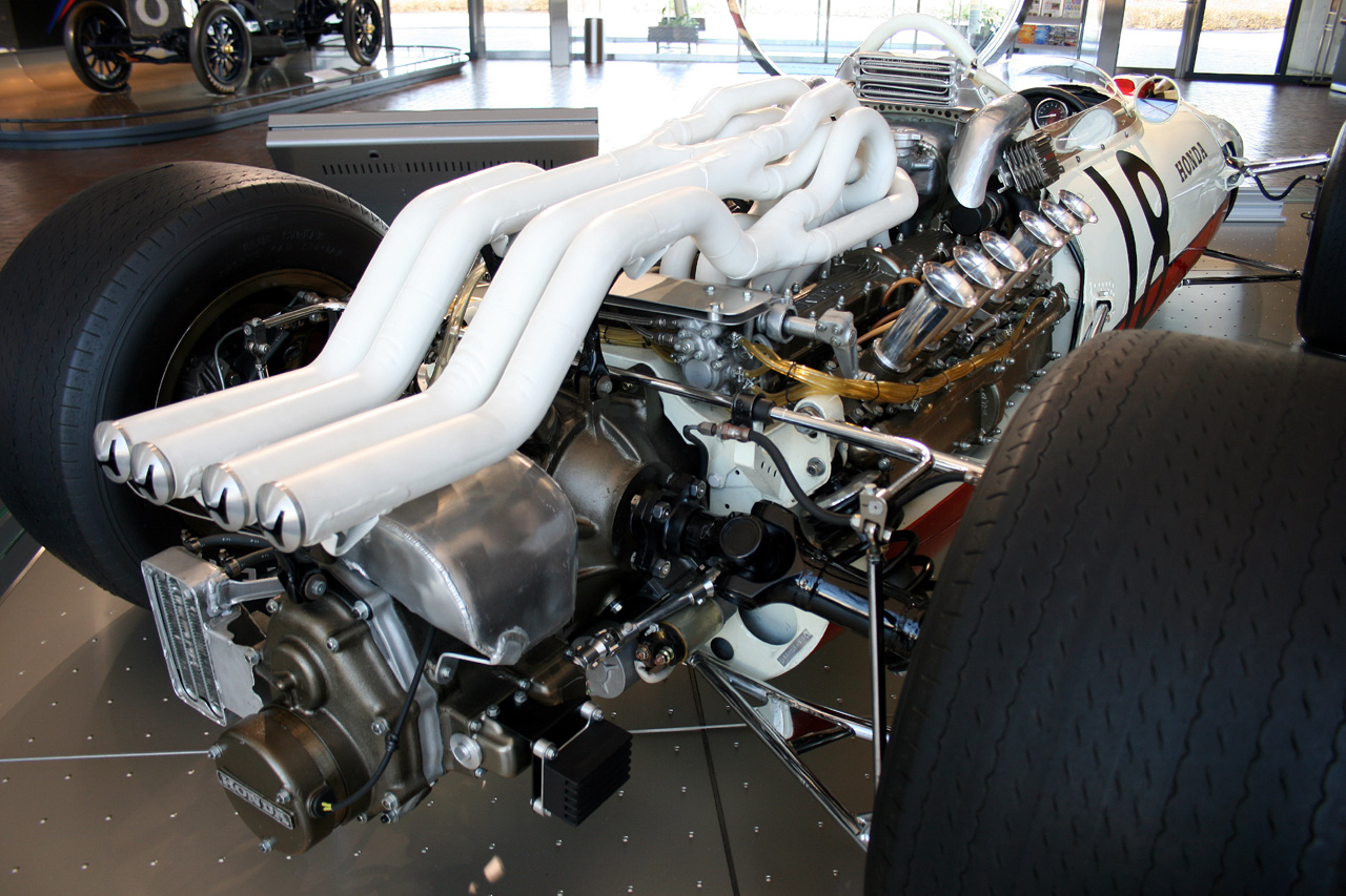 Honda RA273E engine